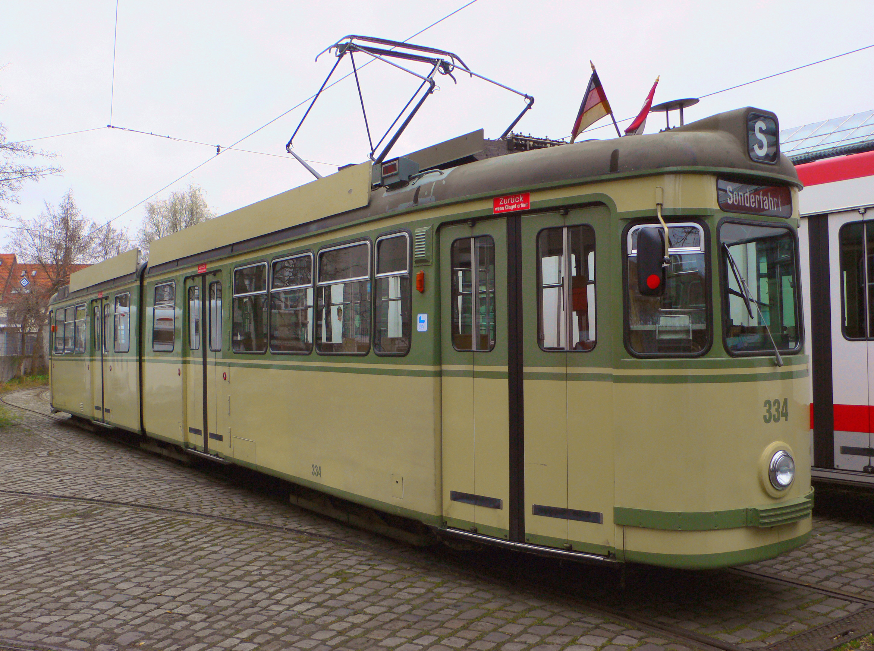 Triebwagen 334 (Typ GT6) der VAG Verkehrs-Aktiengesellschaft Nürnberg (VAG)